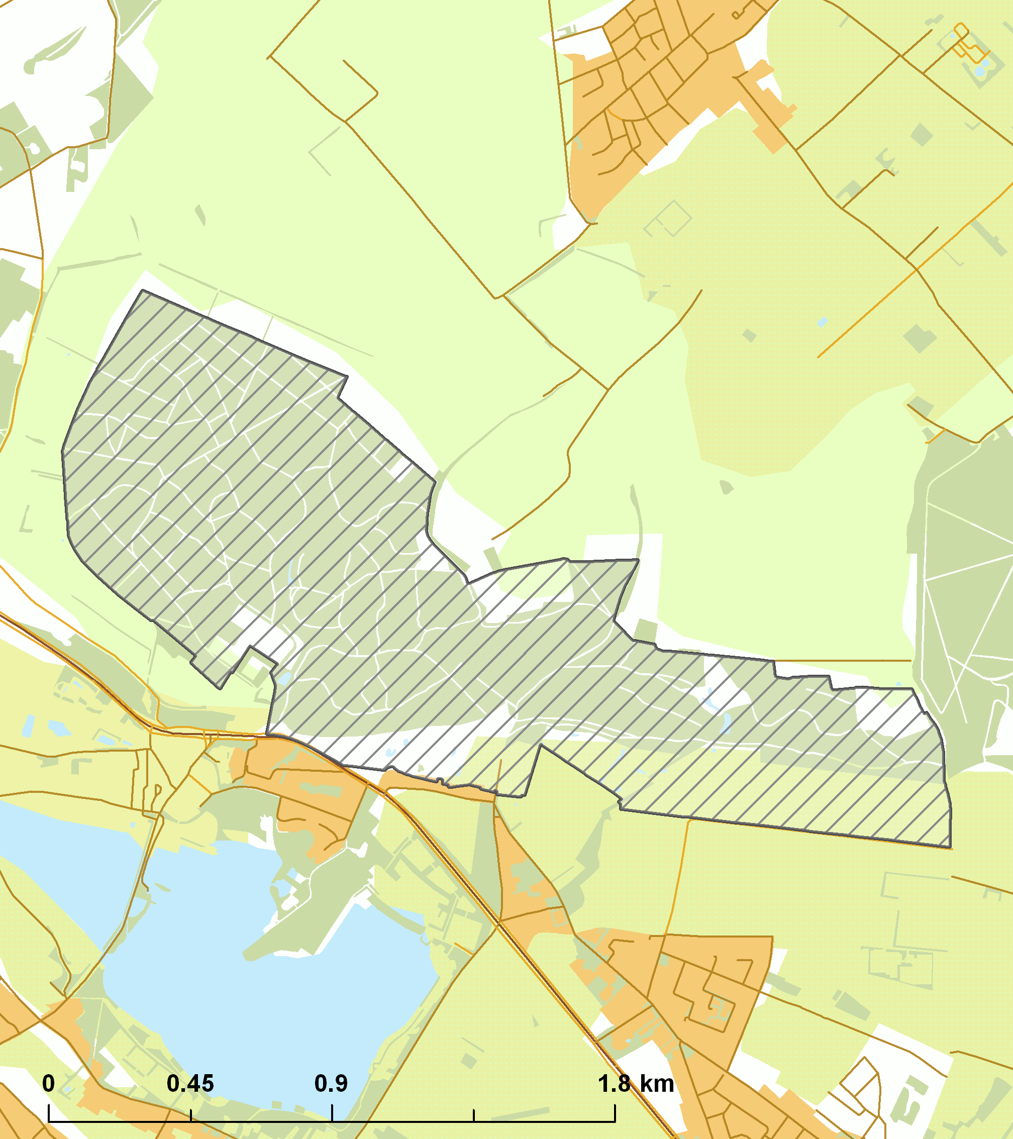 Natura2000 - Sint Jansberg.png